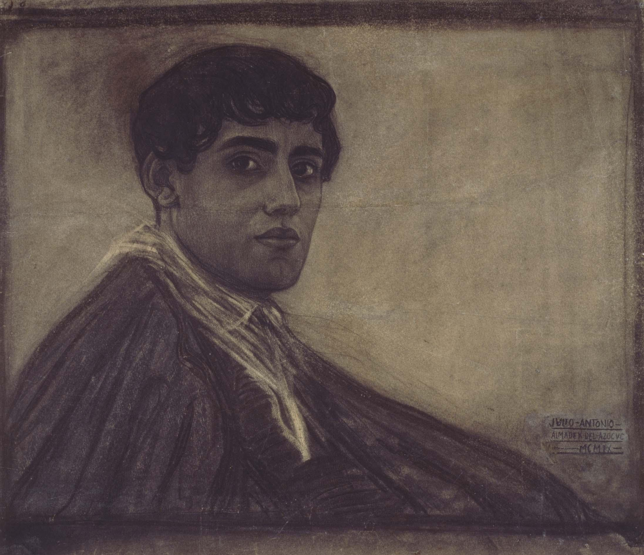 Autorretrato.